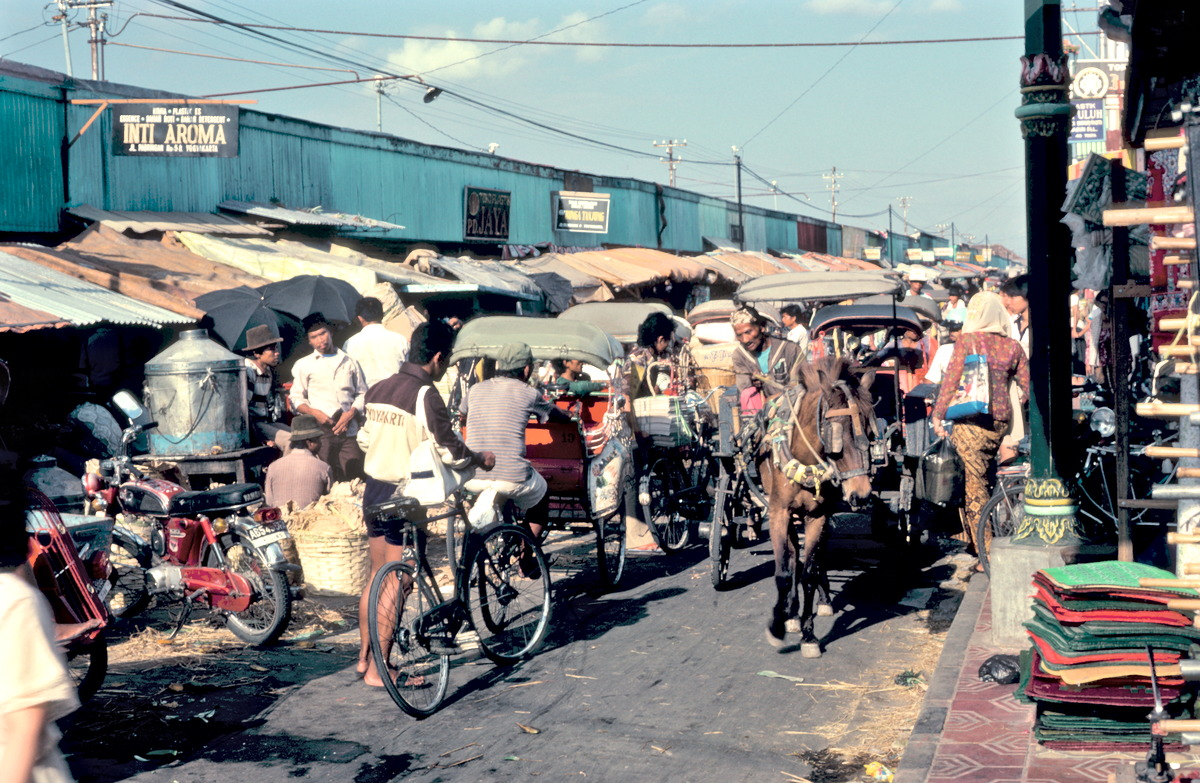 Pasar Beringharjo, Yogyakarta, Java, Indonesia. 1985